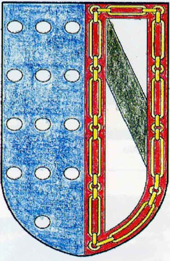 ARMAS DE DON PEDRO ÁVILA Y ZUÑIGA. PRIMER MARQUÉS DE LAS NAVAS.